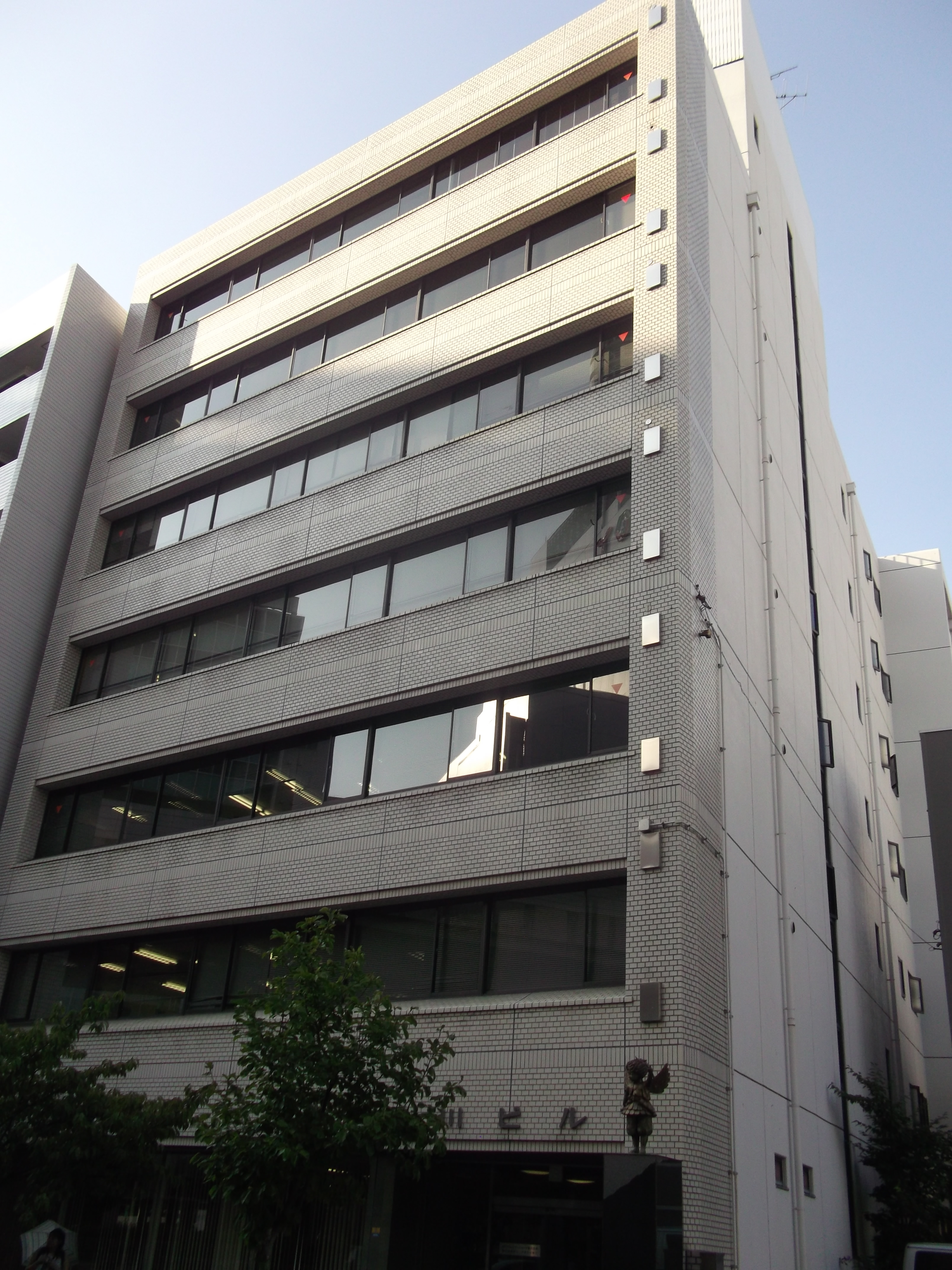 名古屋市東区の西川ビルを南側公道より撮影